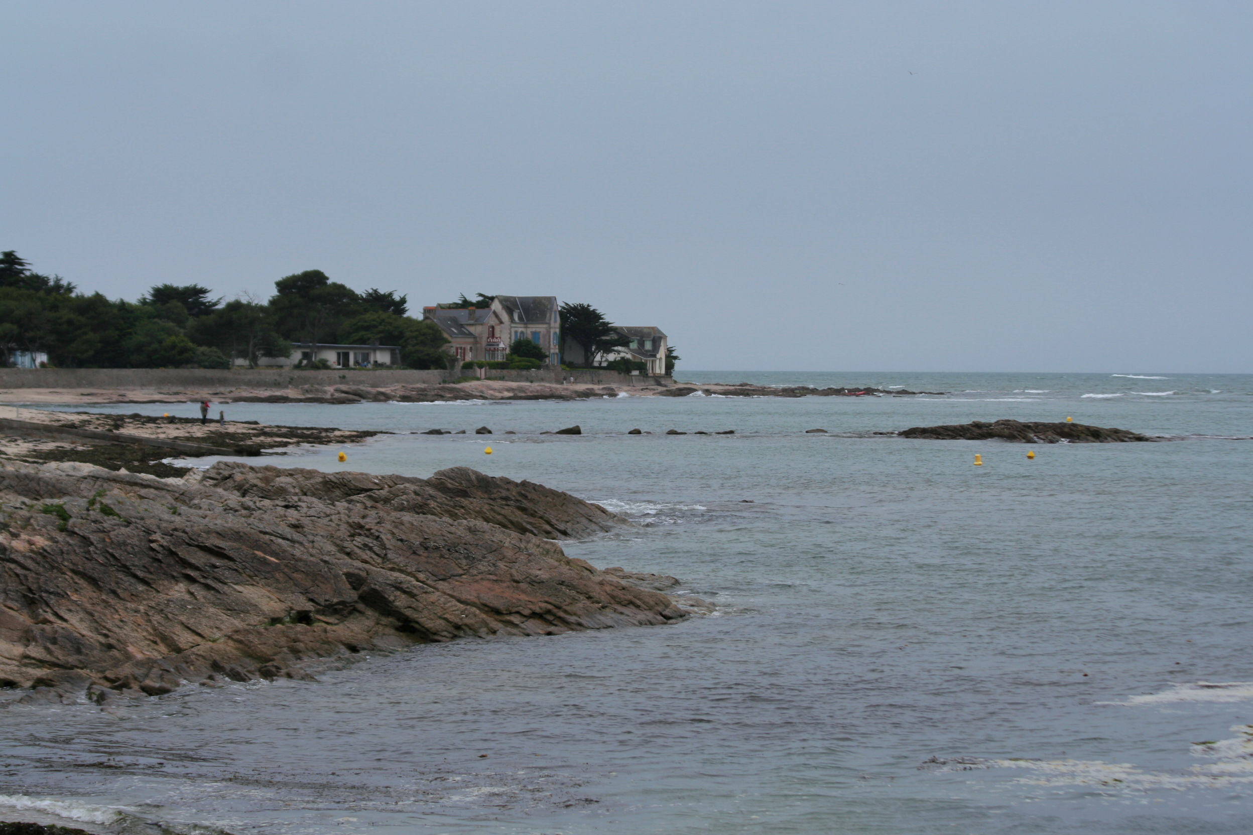 Piriac, vue sur la mer.